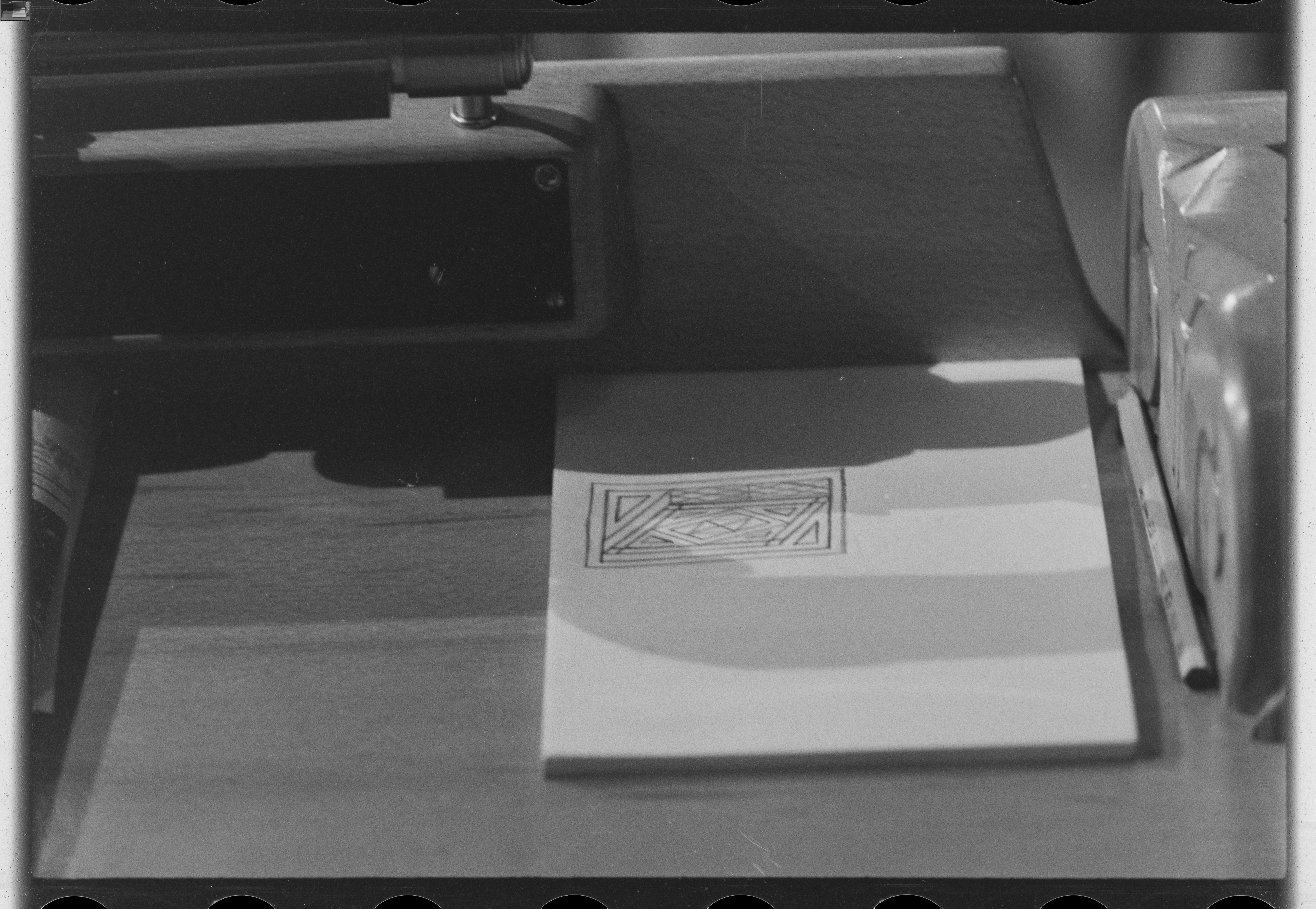 Bildet er hentet fra Arkivverket. Regjeringen Lyngs siste dag, fra debatten i Stortinget Arkivinstitusjon : Riksarkivet Arkivnavn : Billedbladet NÅ Sted : Norge, Oslo, Oslo, Stortinget Emneord: Regjeringer, Lyng Avbildet